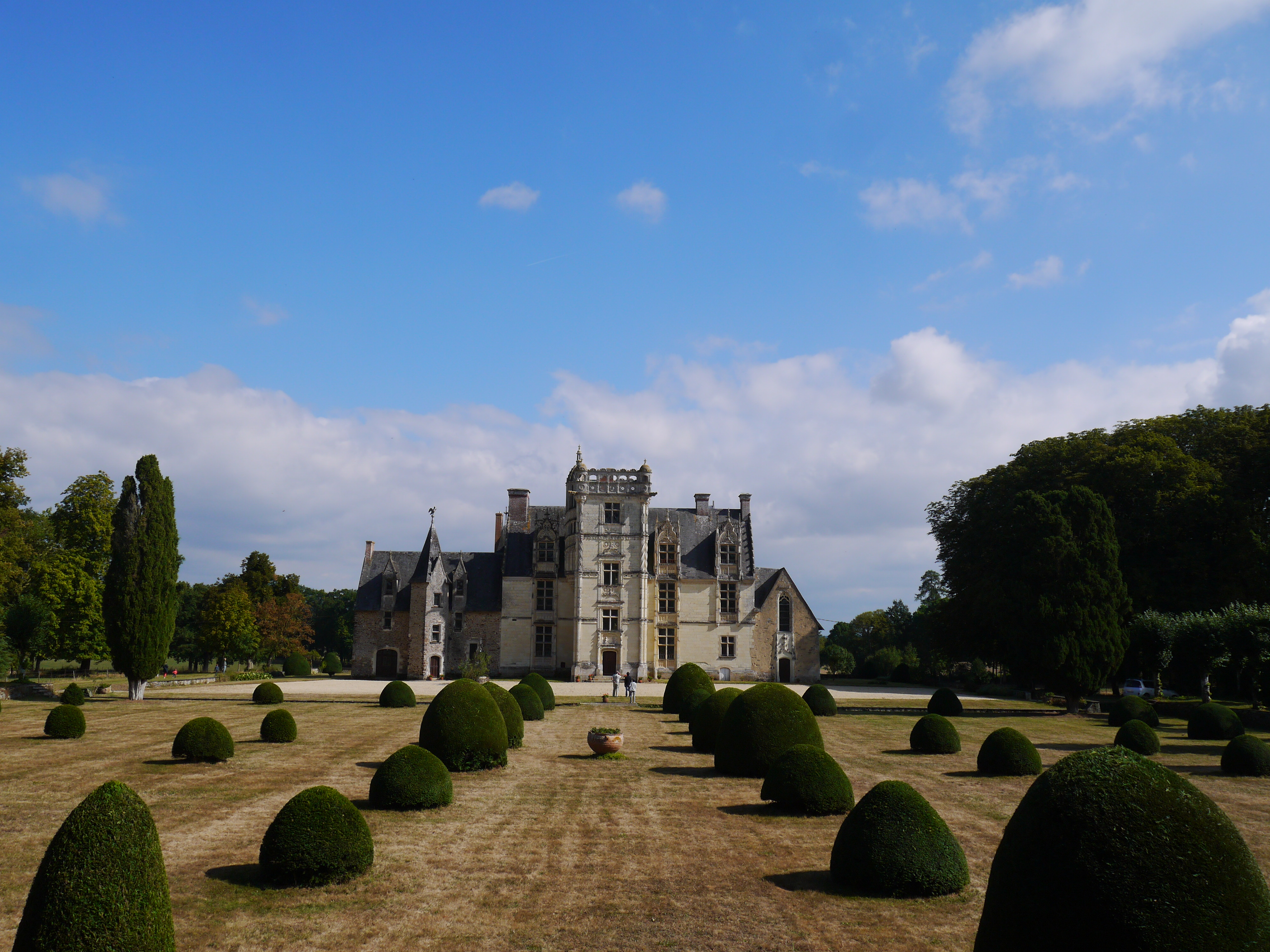 Le château et son parc en 2016.